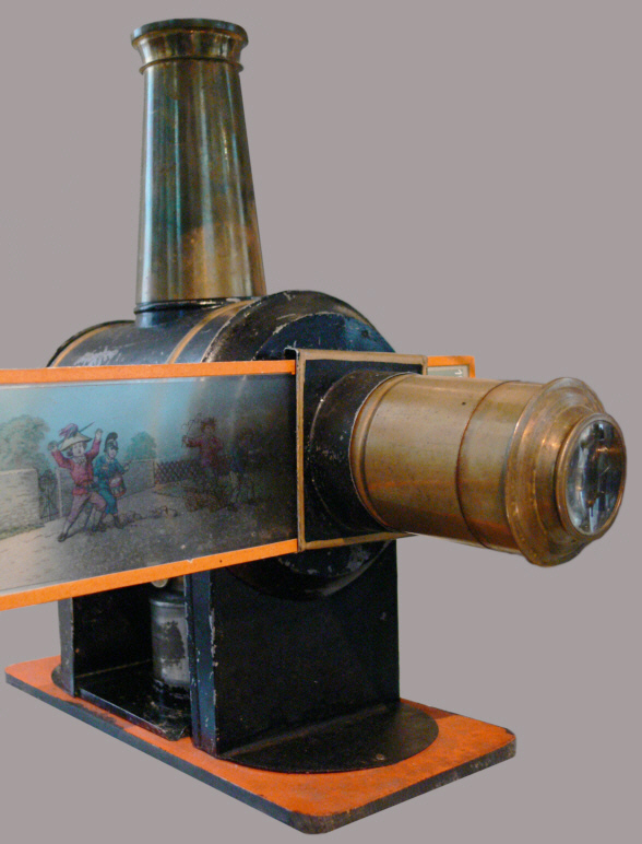 Lanterna magica im Schlossmuseum Aulendorf